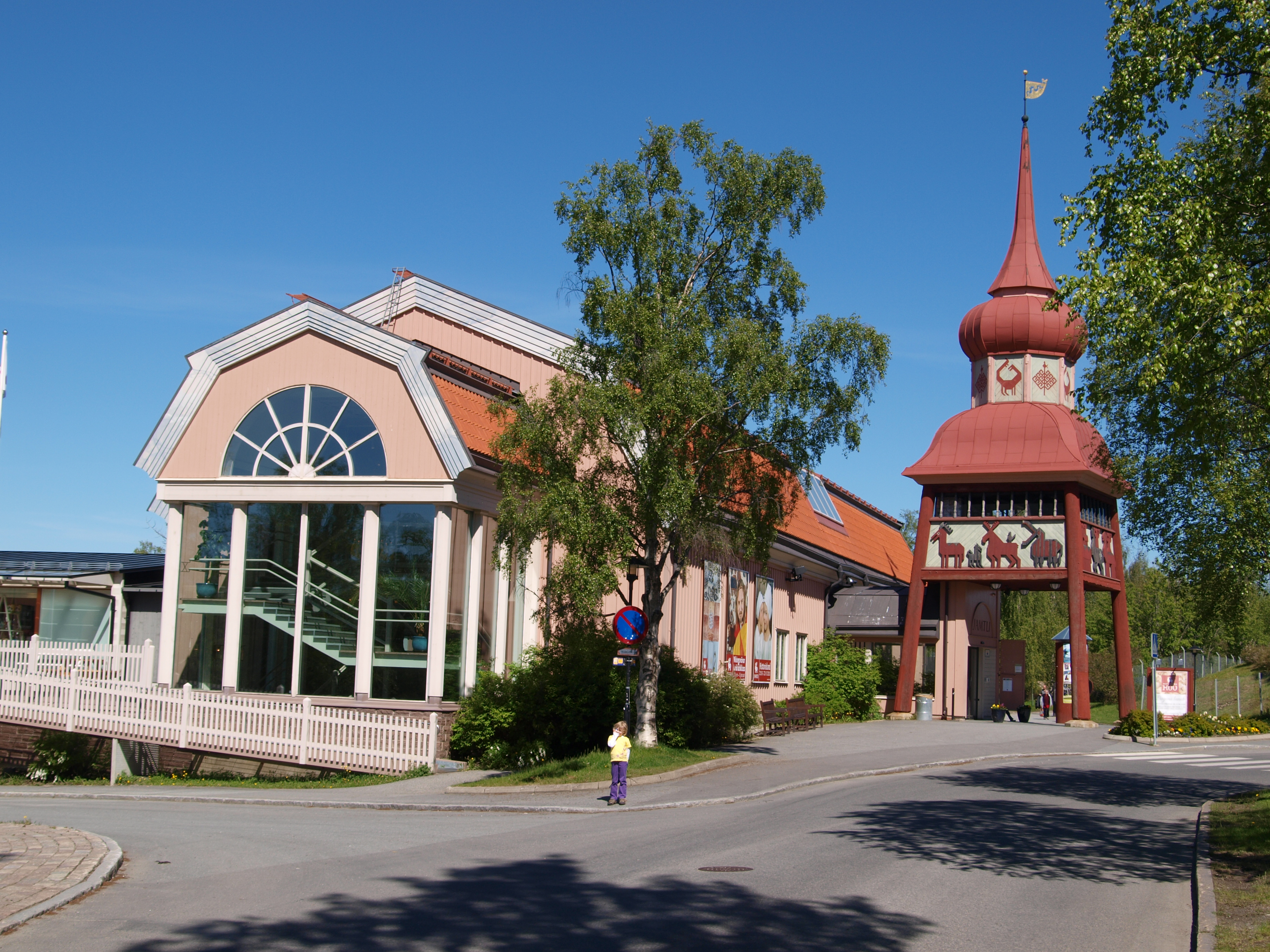 Jamtli